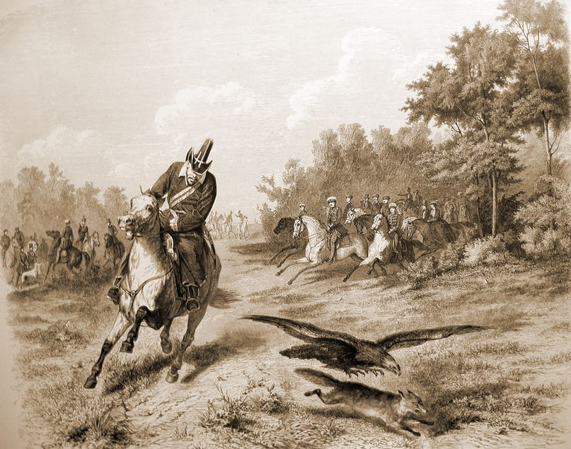 Сцена охоты башкир с ловчими птицами вошла в коронационный альбом императора Александра II в виде рисунка под названием "Охота башкир с соколами в присутствии императора Александра II".